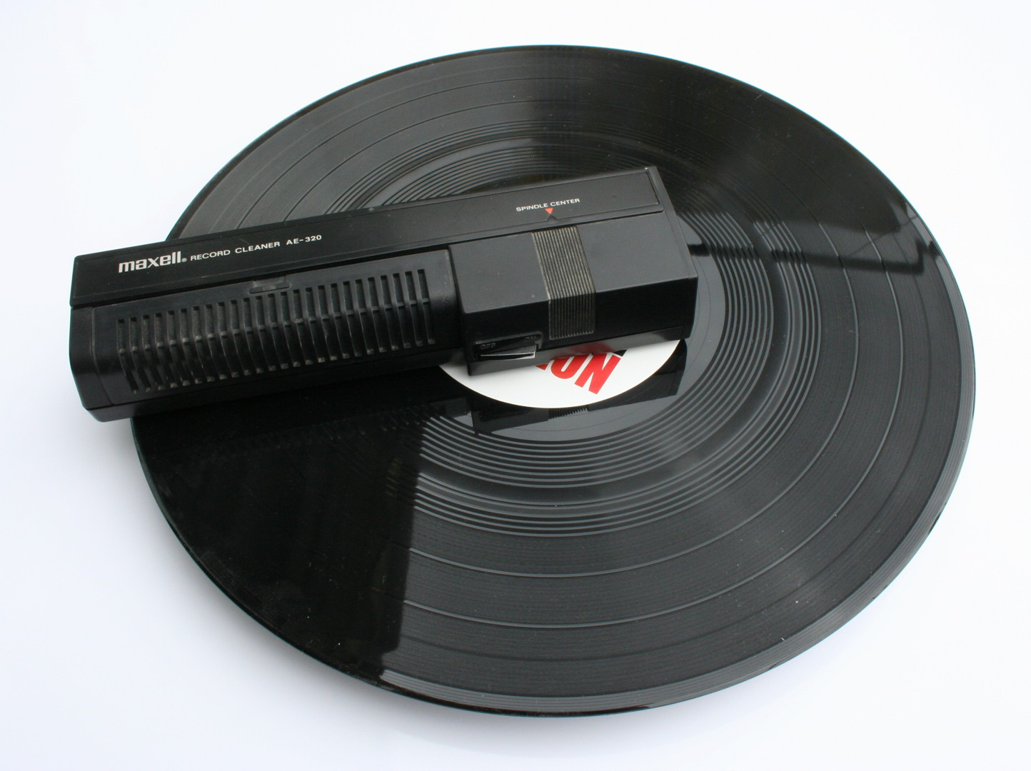 Reinigungsgerät für Schallplatten